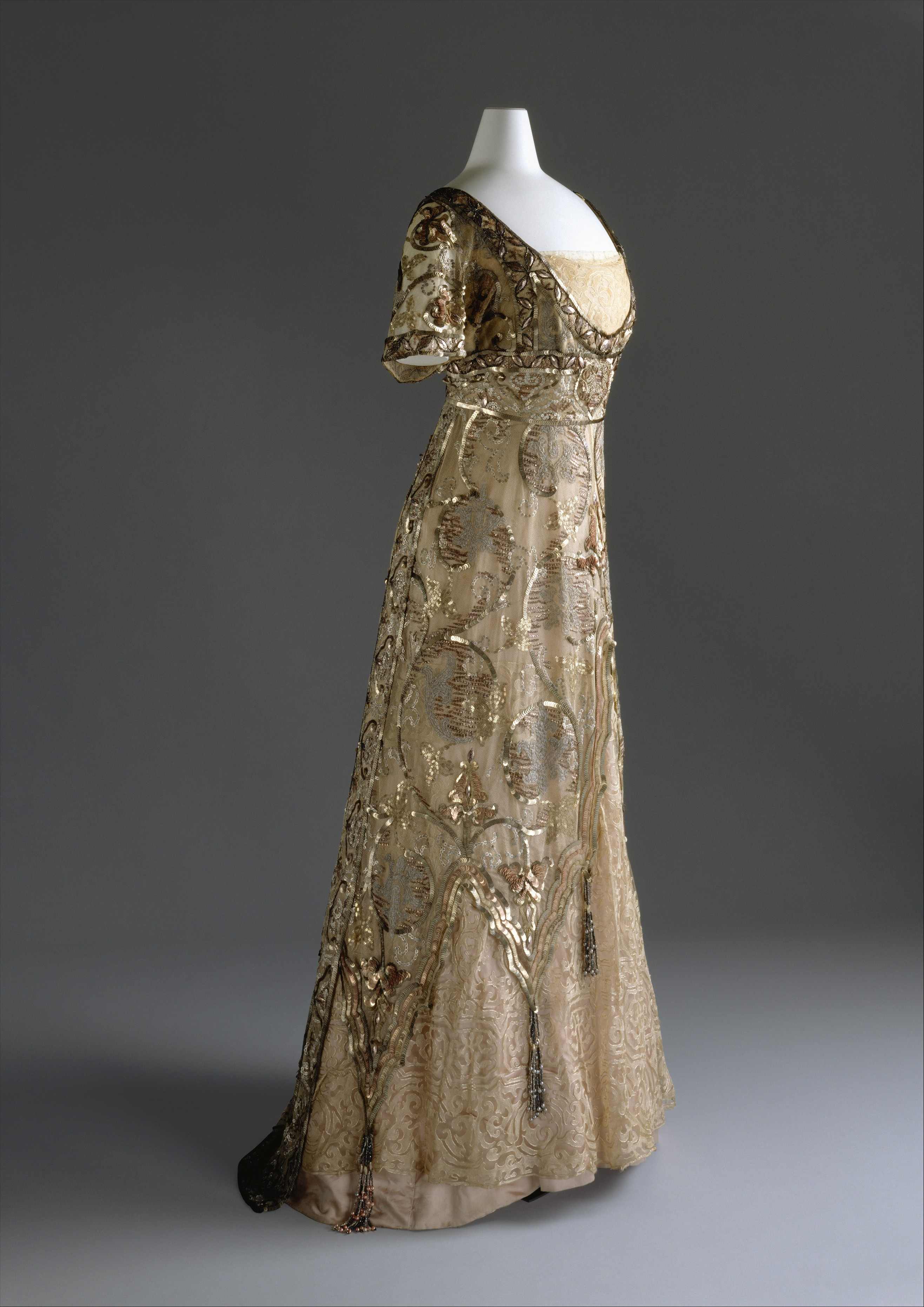 French; Evening dress